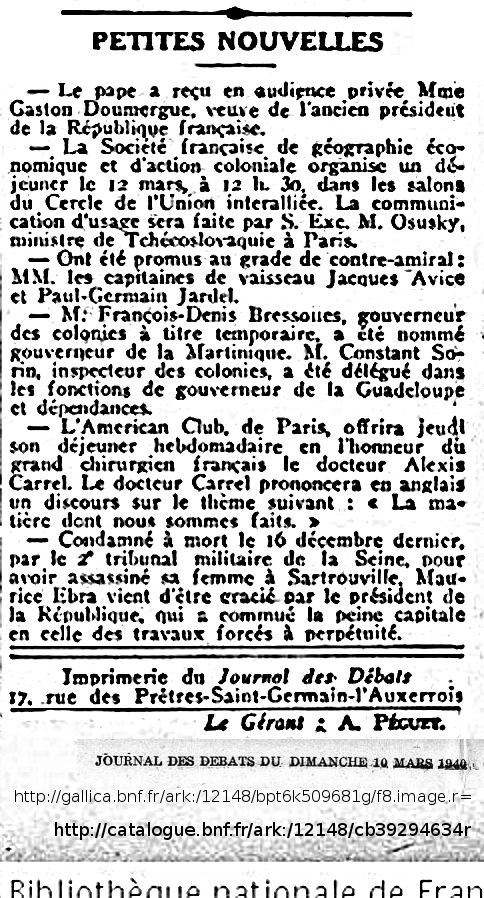 Journal des débats politiques et littéraires, Petites nouvelles, p.8, 10 mars 1940